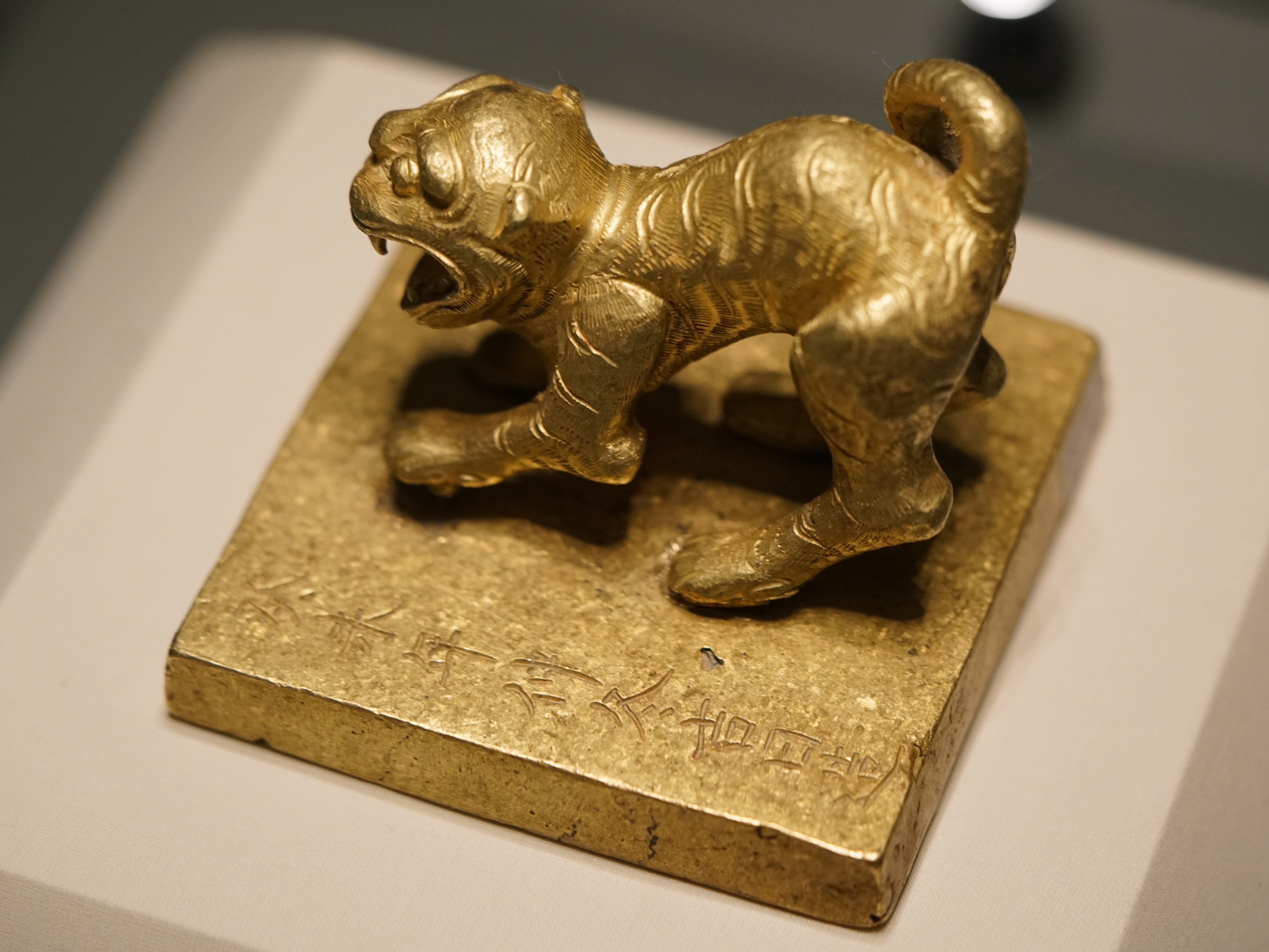 中文（中国大陆）: 虎钮永昌大元帅金印 一级文物 四川眉山5.1特大盗掘倒卖文物案追缴。印面阳文九叠篆书“永昌大元帅印”印背阴刻楷书印名 左侧阴刻楷书“癸未年仲冬吉日造”